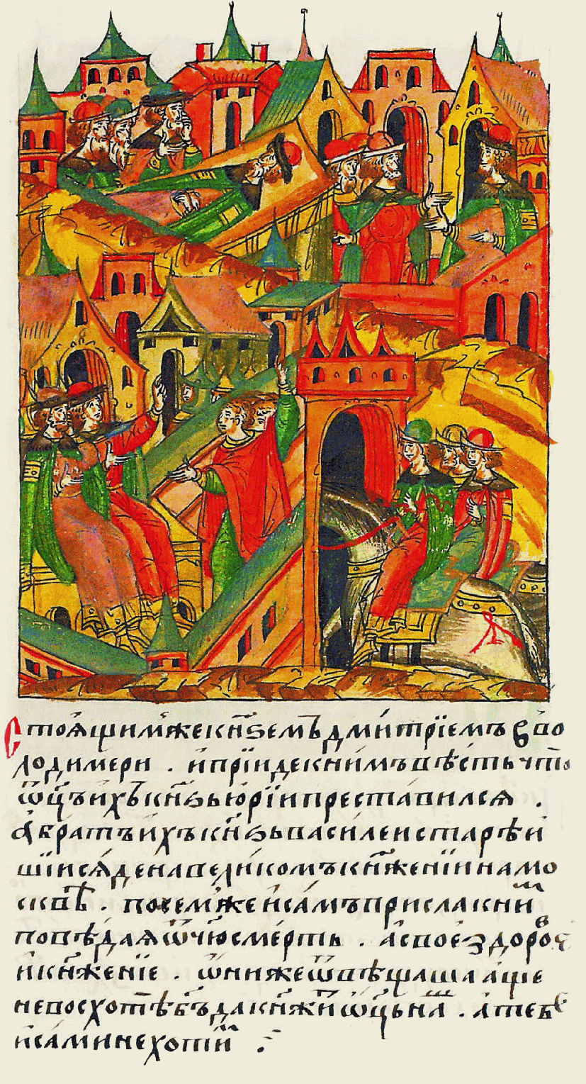 Князьям же Дмитриям, находящимся тогда во Владимире, пришла весть о том, что их отец князь Юрий скончался, а их старший брат князь Василий сел на вели- ком княжении в Мо- скве. Потом же и он сам прислал к ним, поведав о смерти отца, о своем здоро- вье и княжении; они же отвечали: «Пусть не захотел Бог, что- бы княжил наш отец, а тебя и сами не хотим».